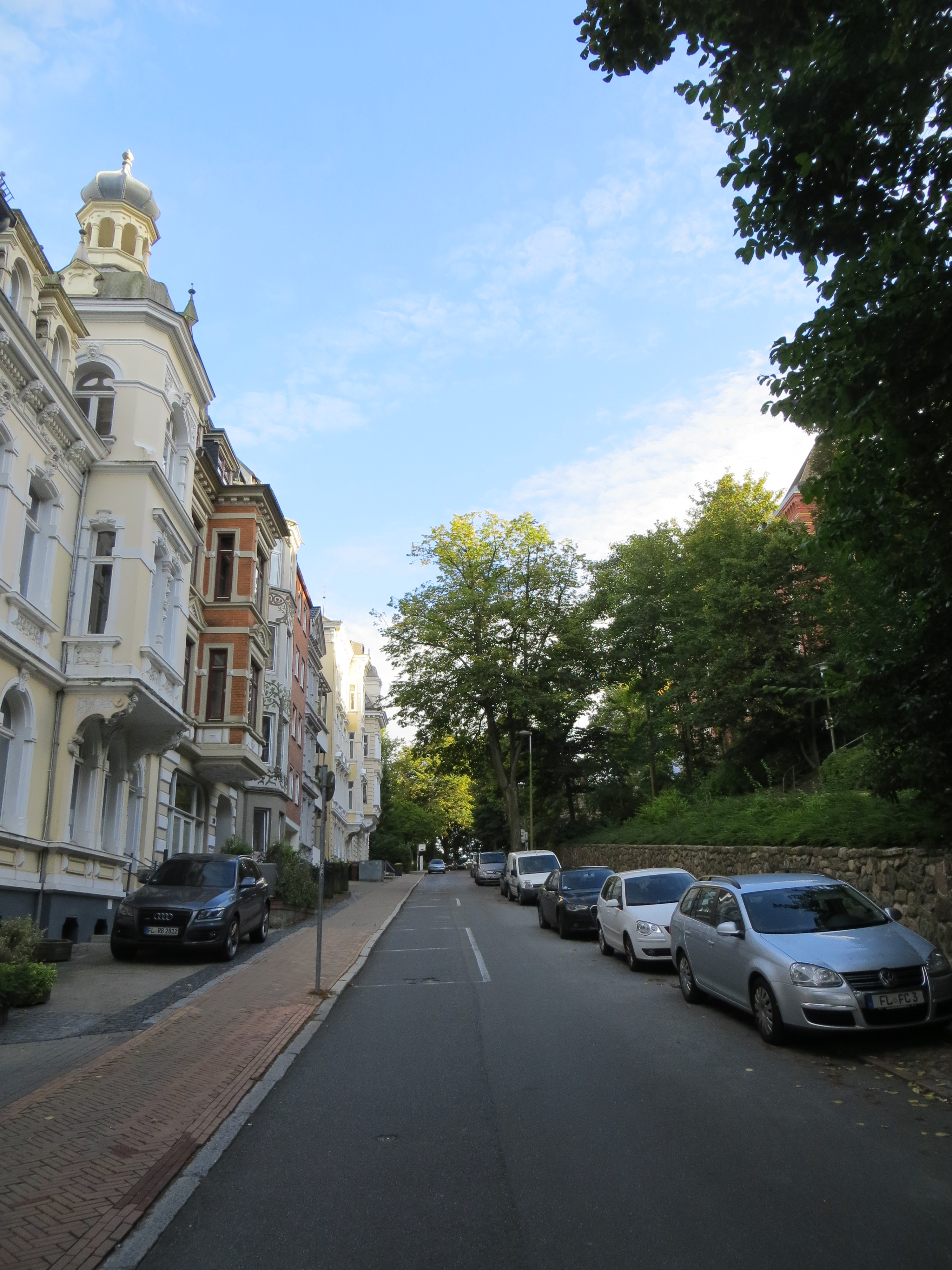 Südergraben (Flensburg), Bild 02